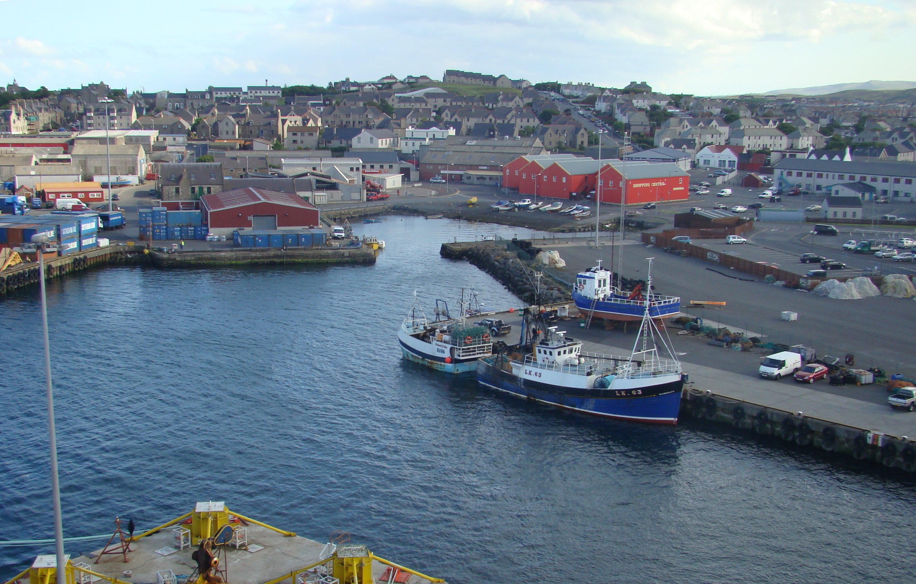 Naturhafen und Stadt Lerwick